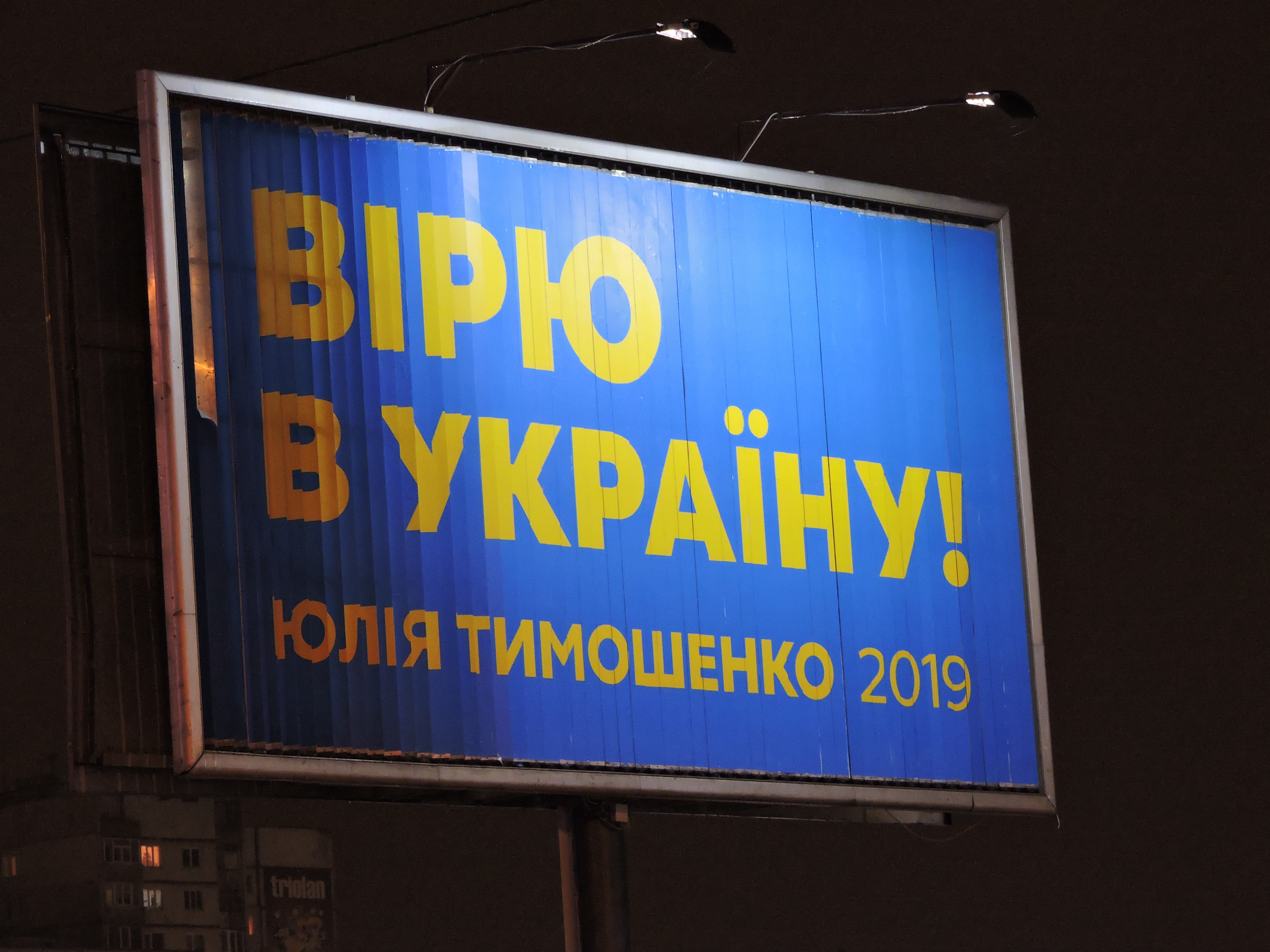 Зовнішня реклама під час агітаційної кампанії виборів Президента України 2019 року від кандидата у Президенти України Юлії Тимошенко із гаслом «Вірю в Україну. Тимошенко 2019.» у нічний час із підсвіткою білборда.Білборд у м. Харкові на вулиці Академіка Павлова біля ст. м. Героїв Праці. Лютий 2019 року.